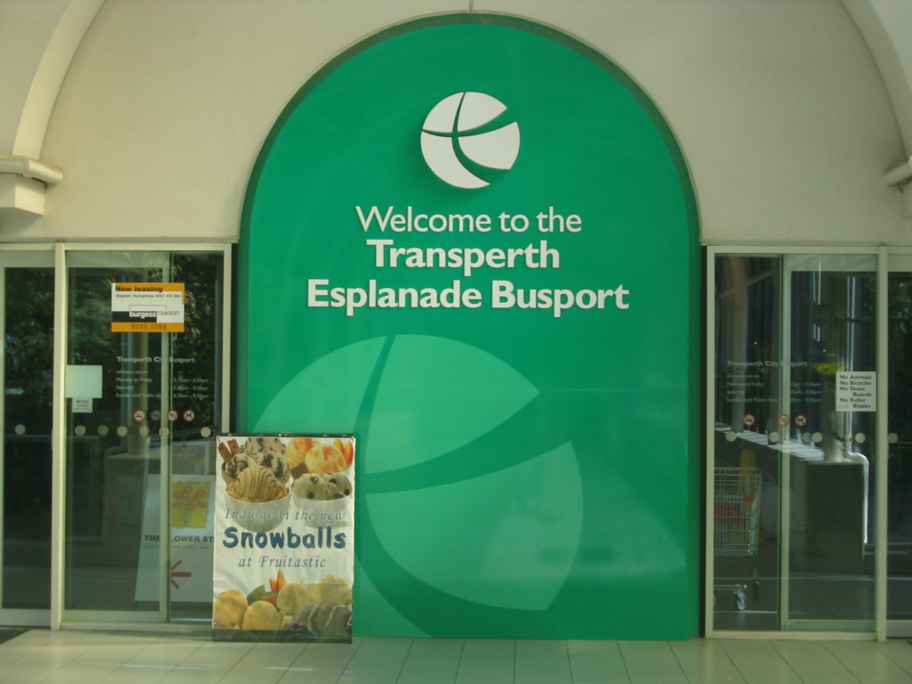 Transperth Esplanade Busport